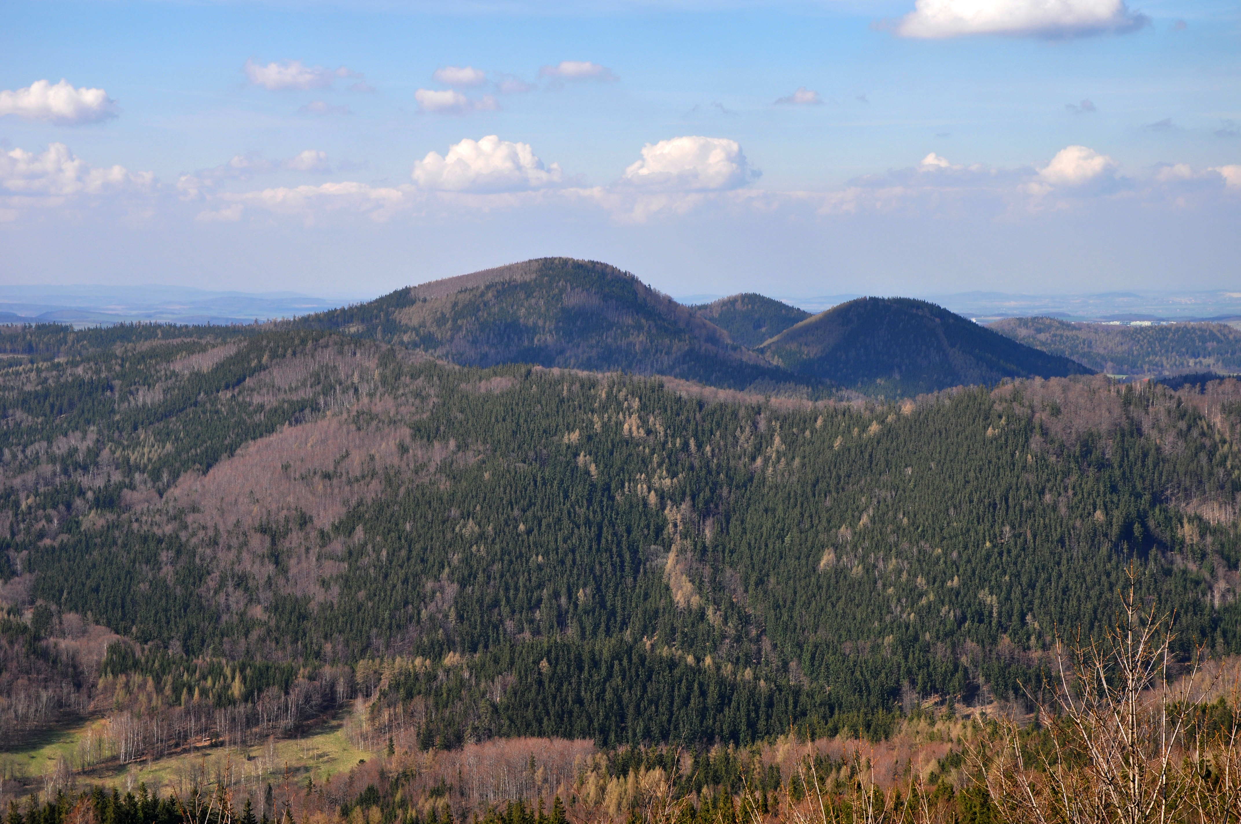 Rybnicki Grzbiet, za nim Borowa i Sucha, (a między nimi Wołowiec), Góry Wałbrzyskie widziane ze szczytu (ruin zamku) góry Rogowiec